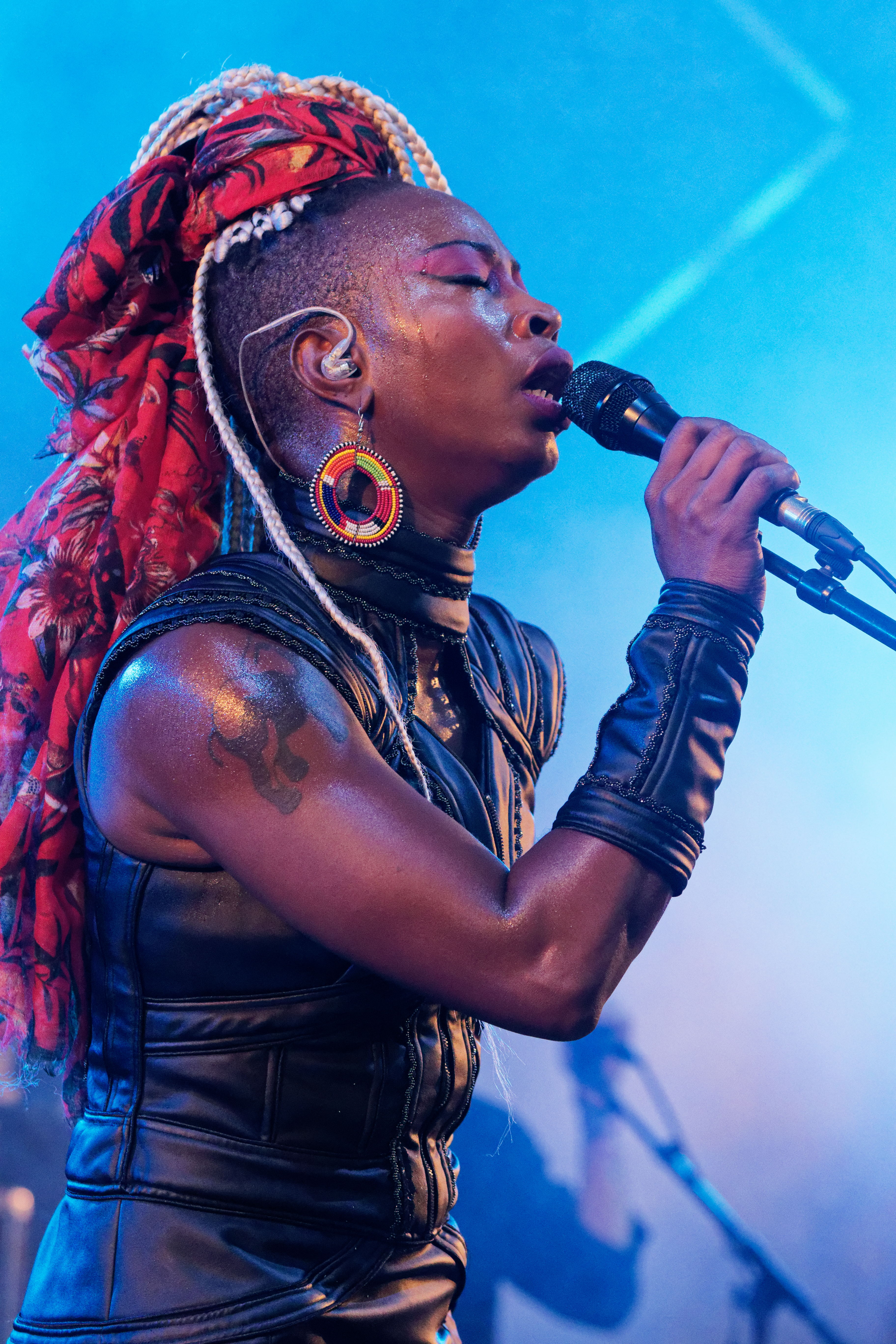 Dobet Gnahoré en concert sous le chapiteau de Seb lors du festival du Bout du Monde 2018 à Crozon dans le Finistère (France).